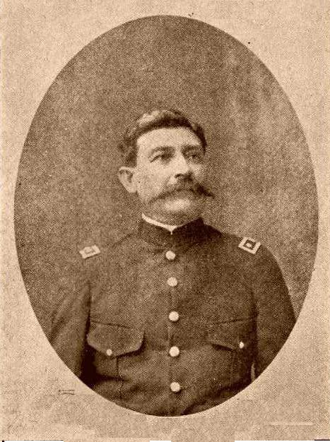 General Miguel S. Gonzalez